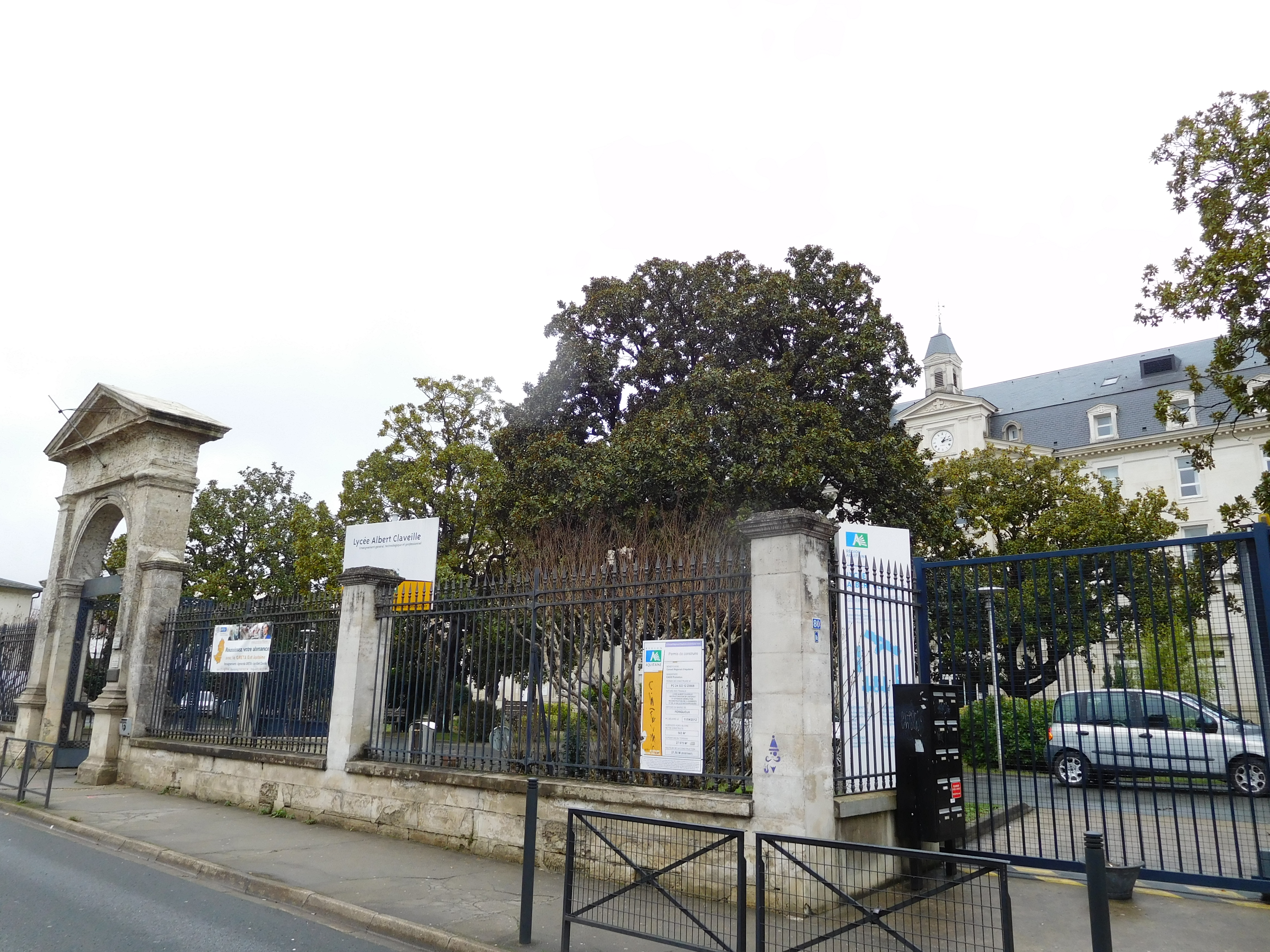 Lycée Albert-Claveille : parc et porche. Périgueux (Dordogne, France).